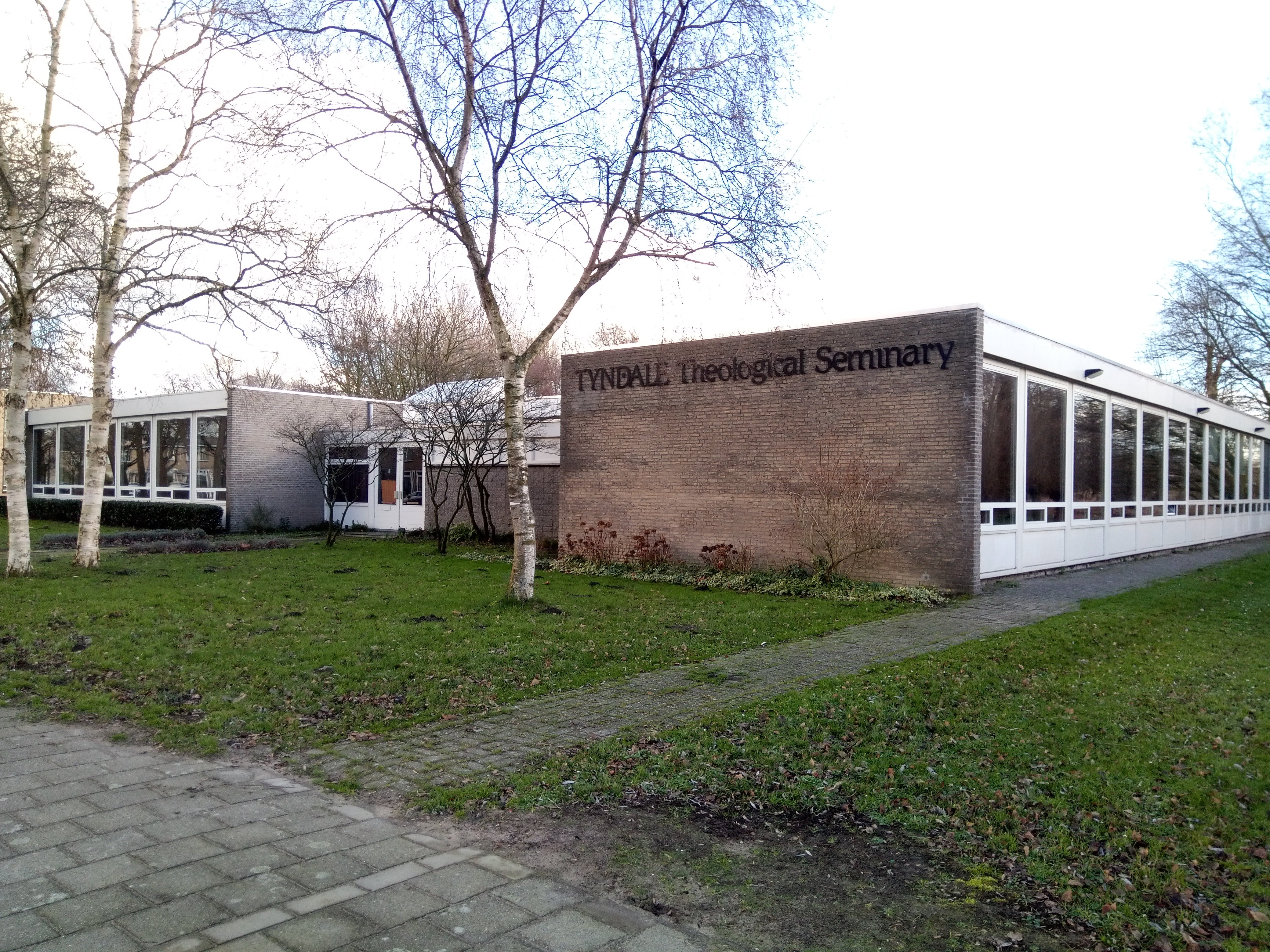 Tyndale Theological Seminary (Europe) in Badhoevedorp